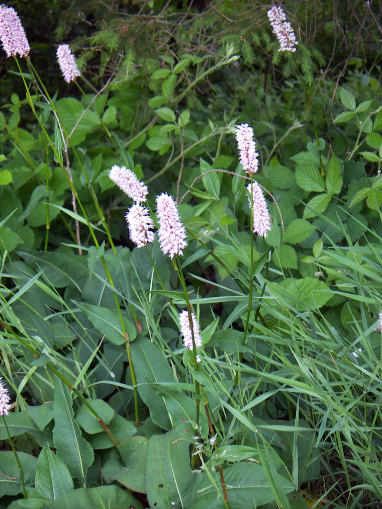 Persicaria bistorta Schlangenknöterich, aufgenommen in der Eifel am 15.6.2005